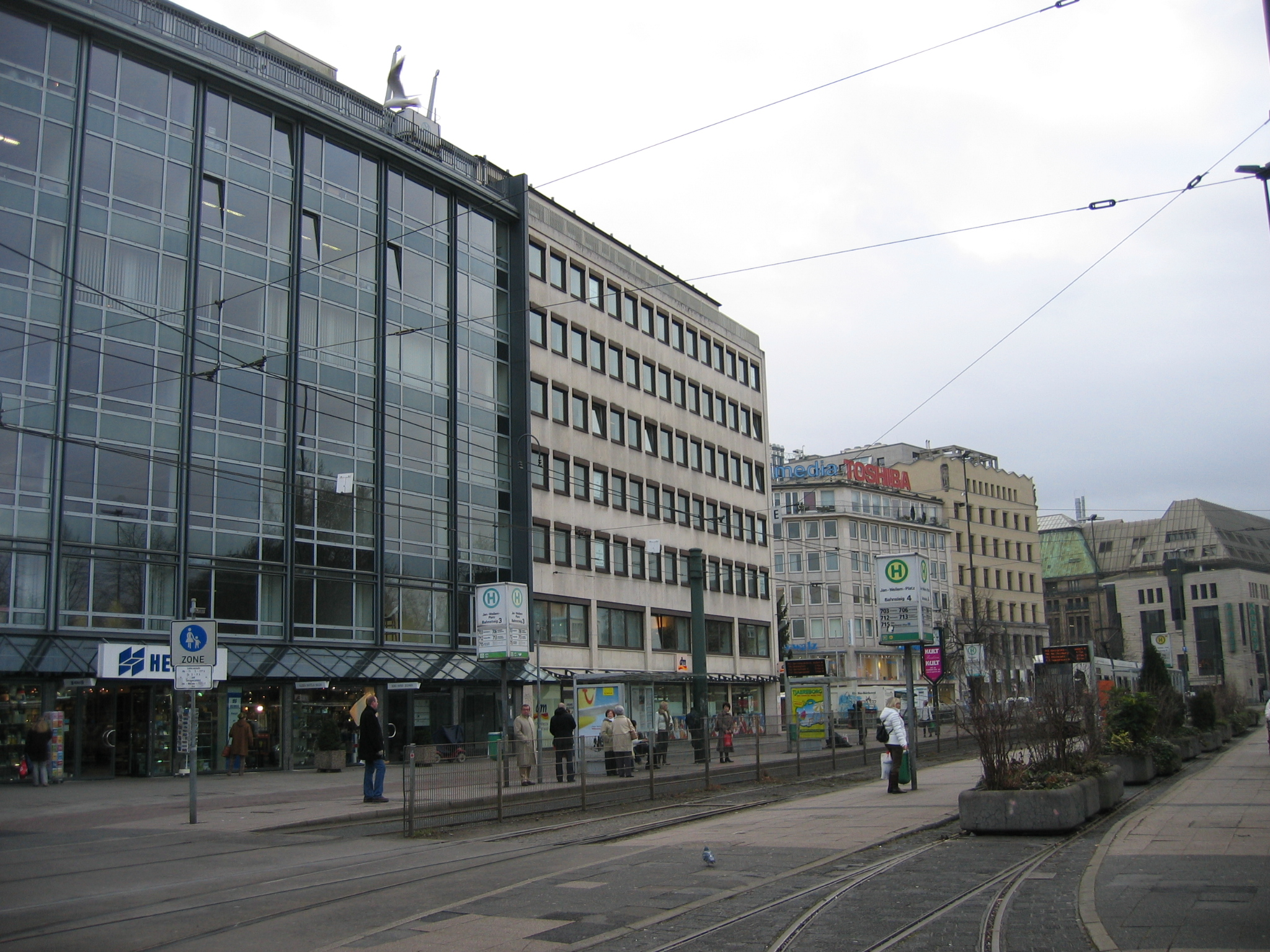 der Jan-Wellem-Platz in Düsseldorf vor der Bebauung mit dem Kö-Bogen